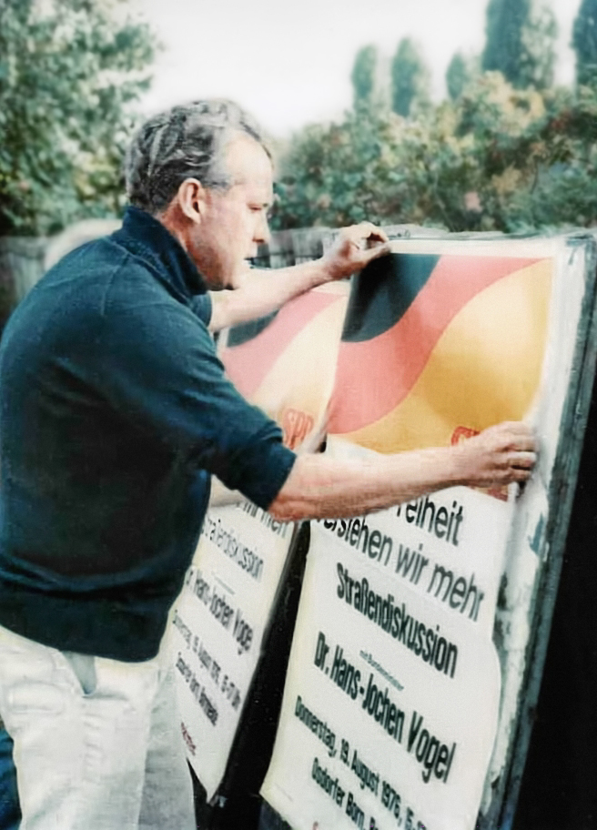 Minister Hans Apel klebt Plakate für einen Wahlkampfauftritt Hans-Jochen Vogels im Osdorfer Born in Hamburg